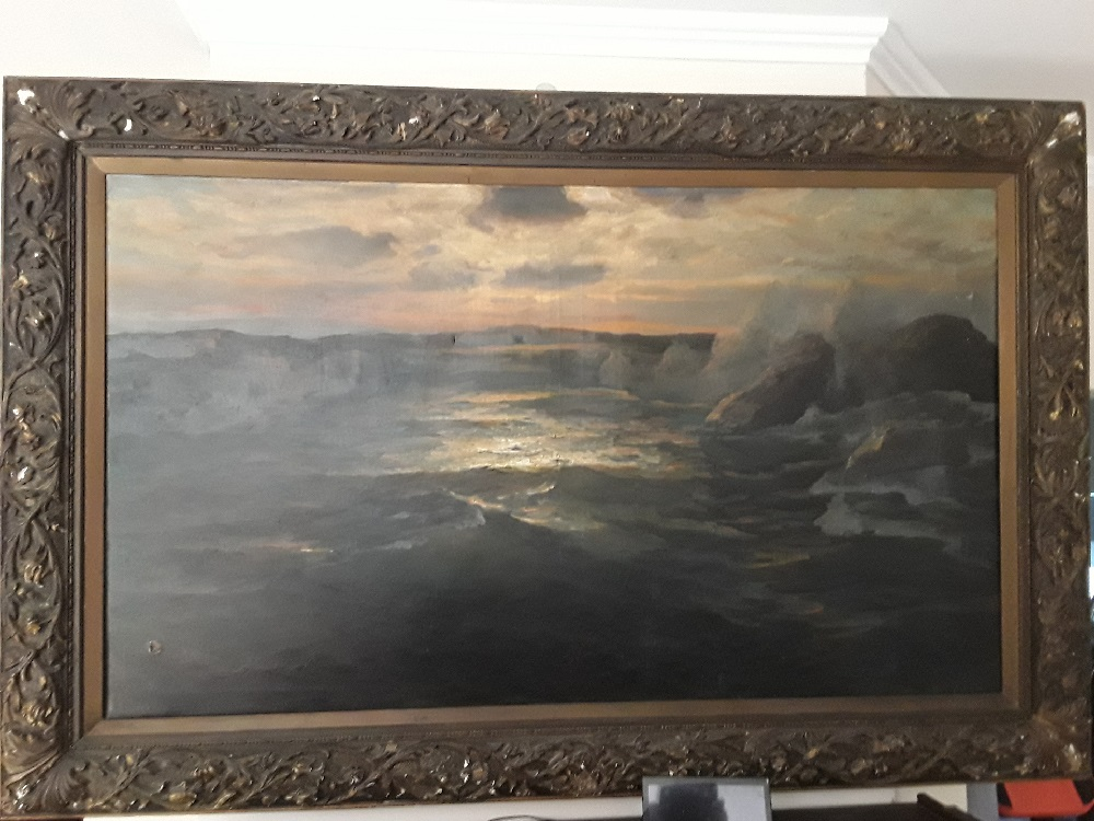 Картина в частной коллекции с ca.1910г, Таллин